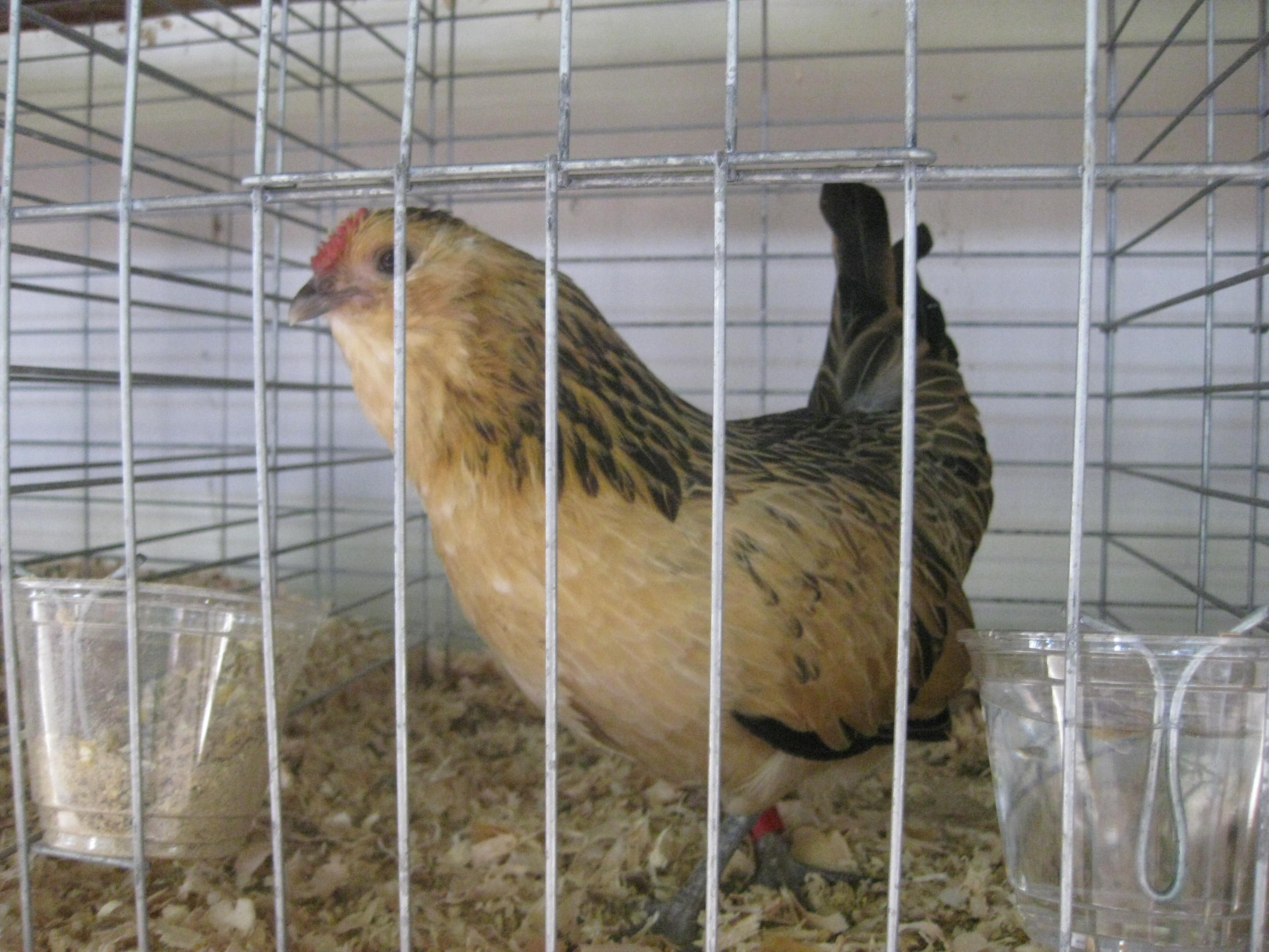 A Belgian Bearded d'Anvers hen.